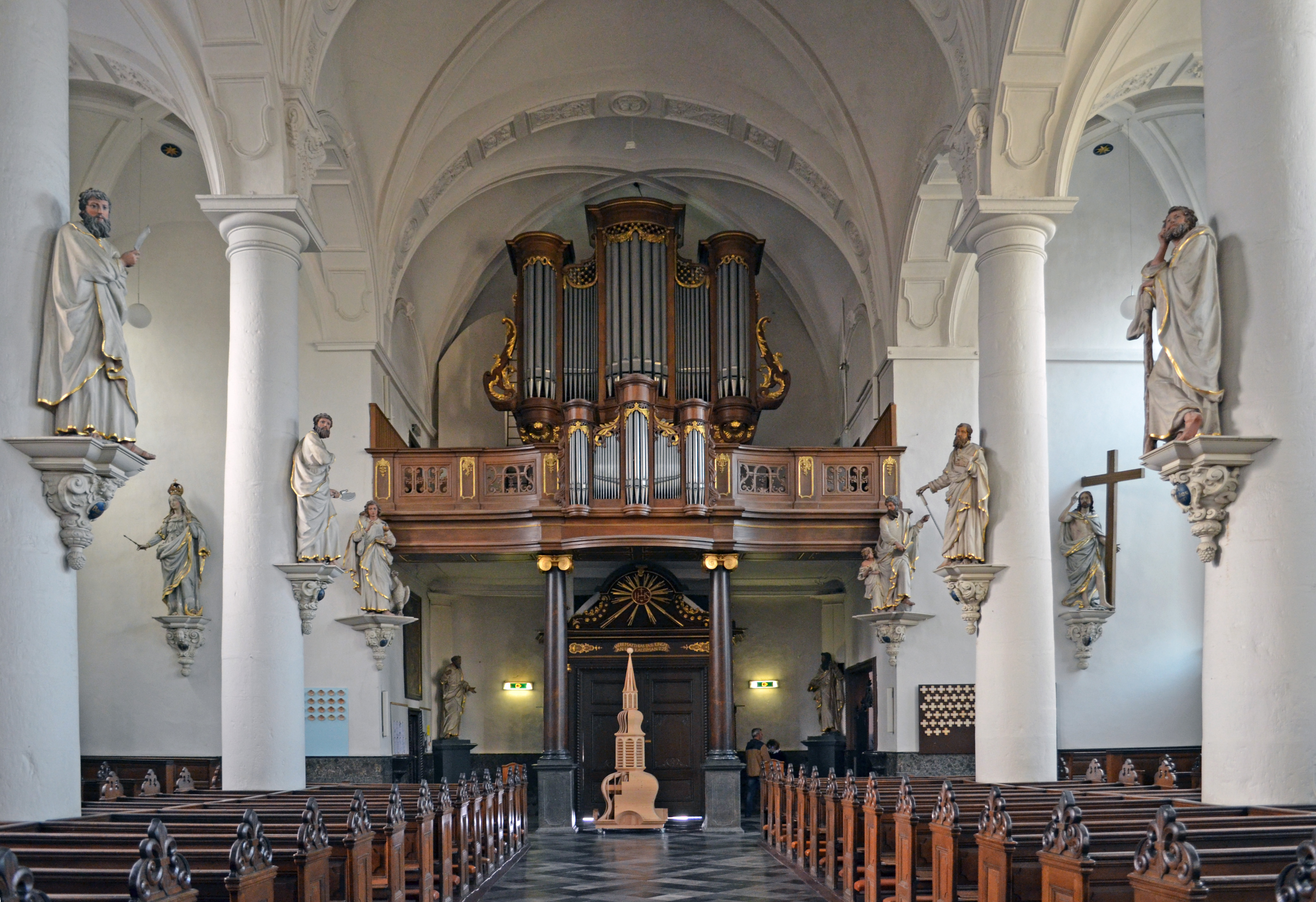 Kirche St. Nikolaus in Eupen, Innenansicht